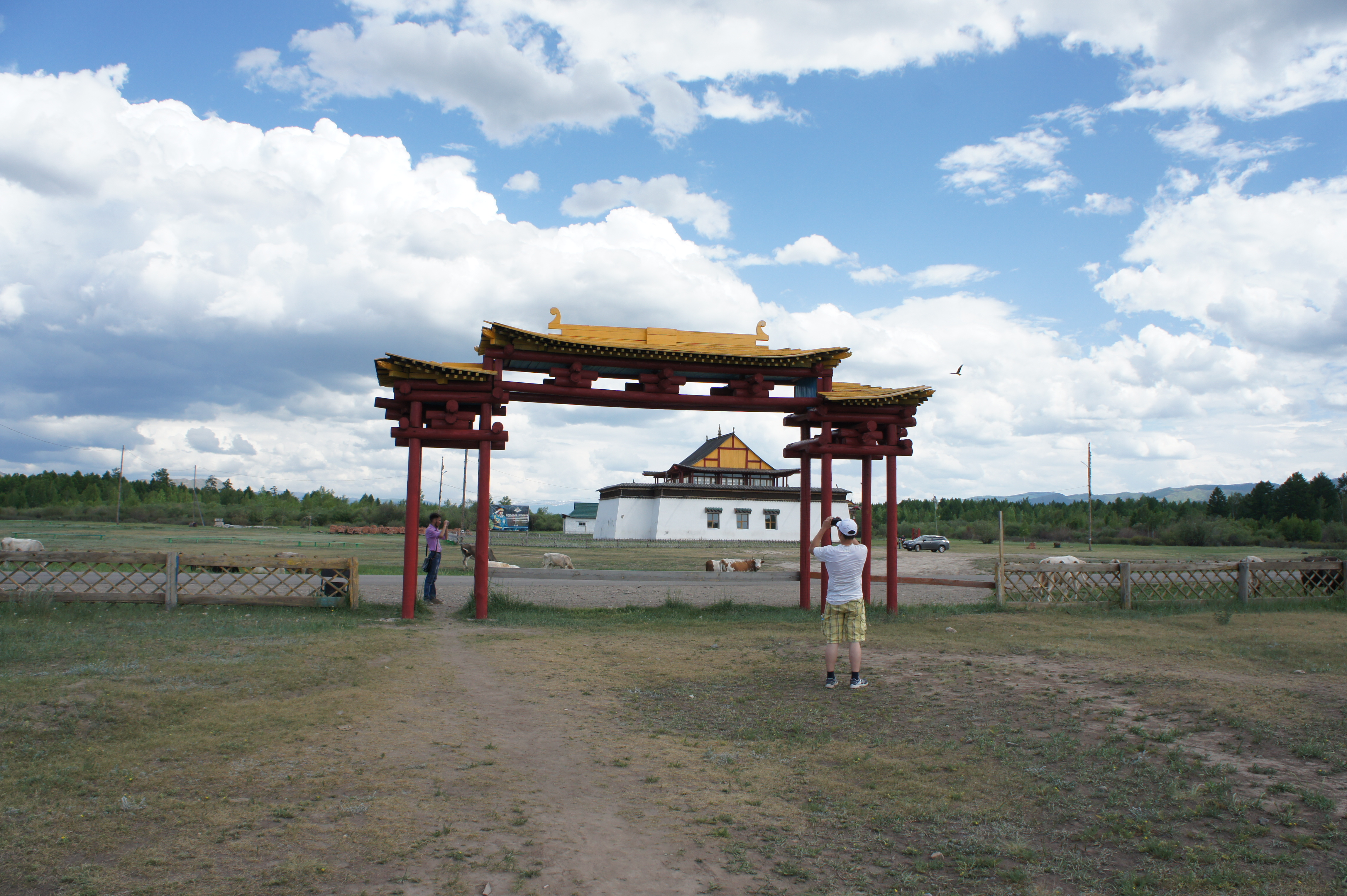 ворота в устуу-хурээ